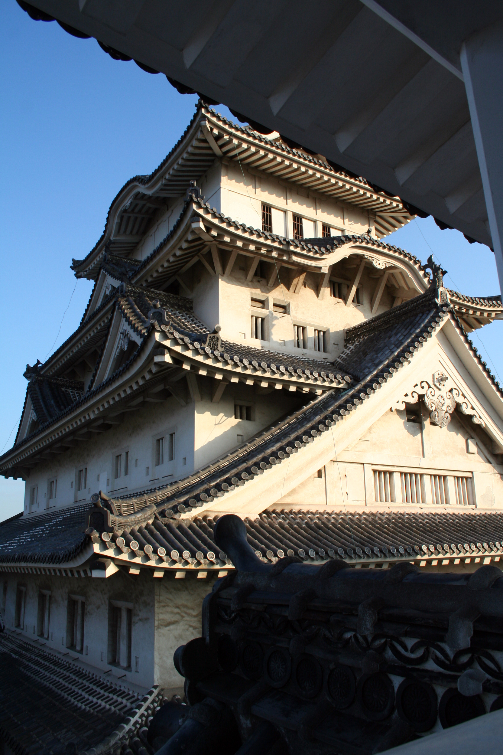 2009年秋の姫路城。 乾小天守から大天守を撮影。